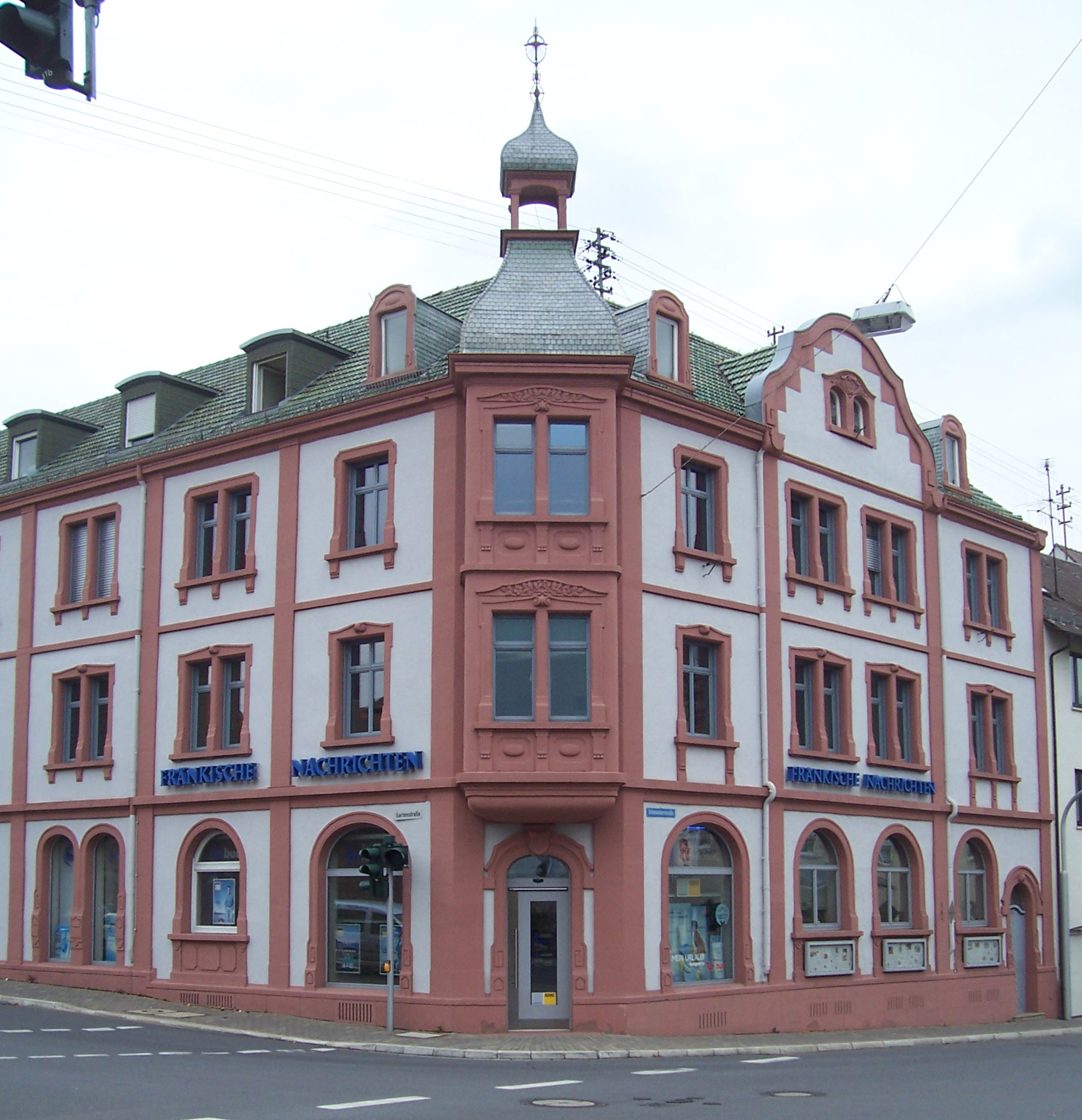 Frankoniahaus in Tauberbischofsheim, Schmiederstraße 19. Sitz der Fränkische Nachrichten Verlags-GmbH.